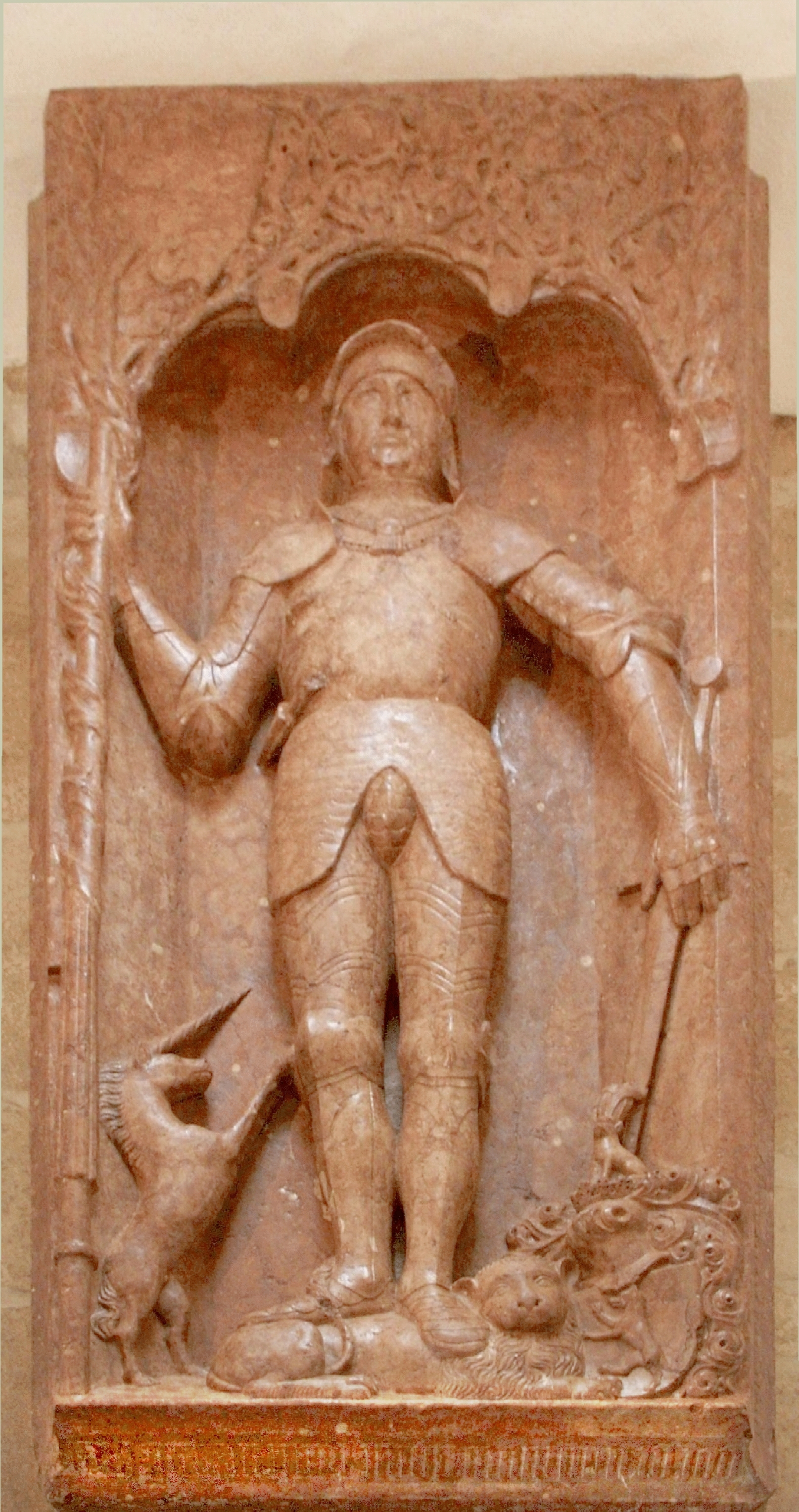 Grabplatte des Hanns von Wulfestorff in der katholischen Pfarrkirche heiliger Martin in Sitzendorf an der Schmida